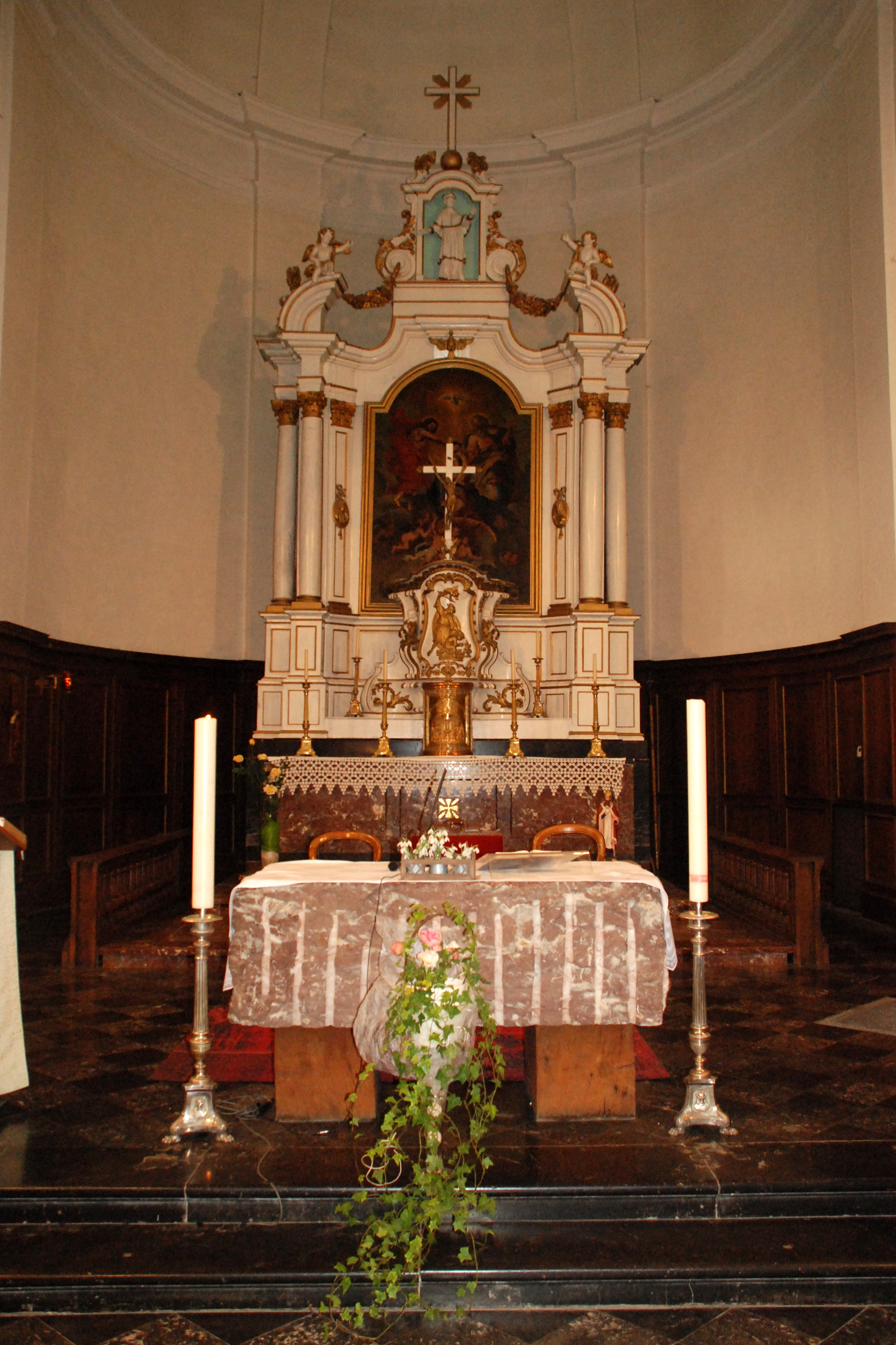 Belgique - Province de Namur - Viroinval - Nismes - église Saint-Lambert (1829)